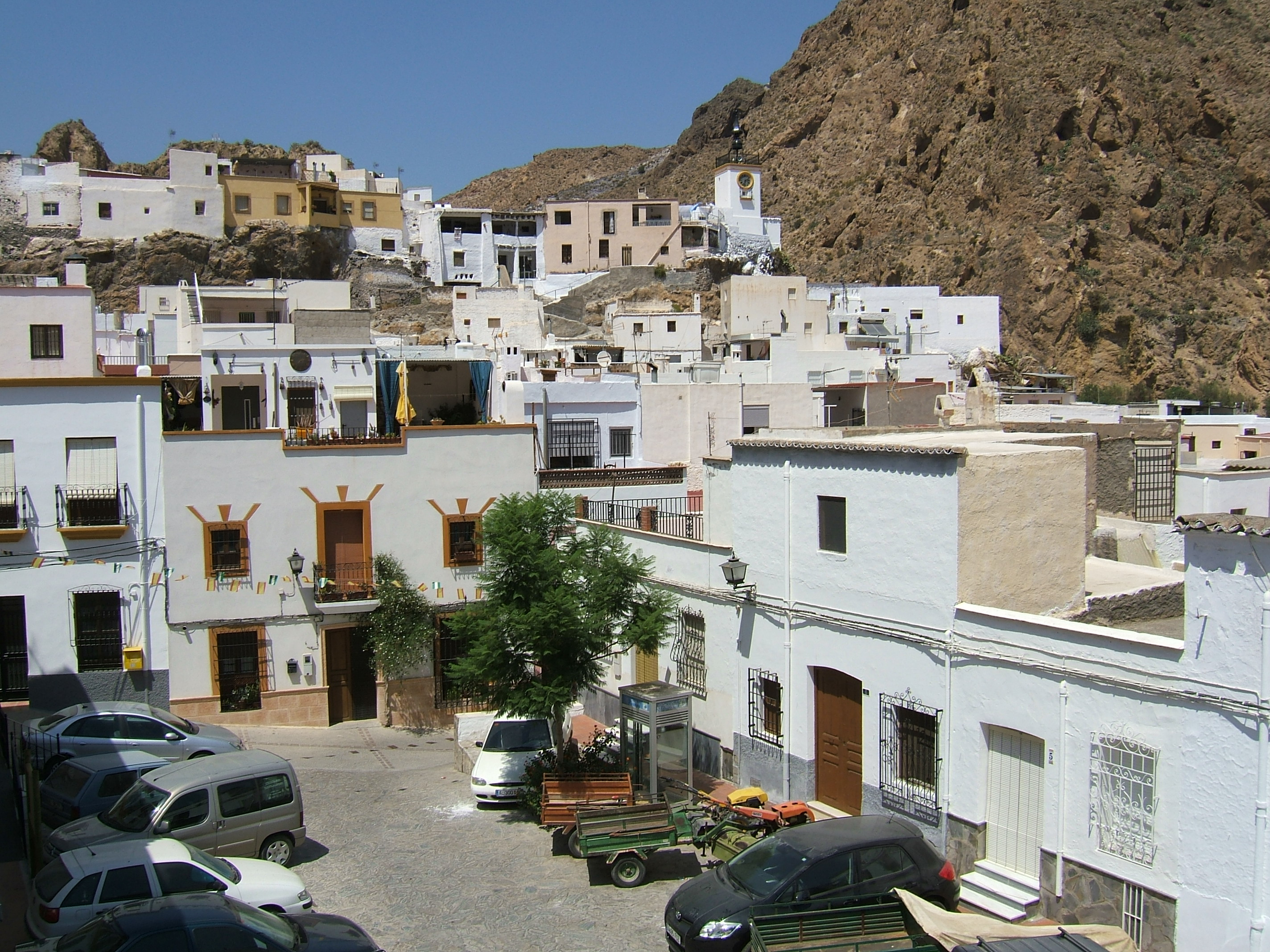 Центральная площадь Алболодуй